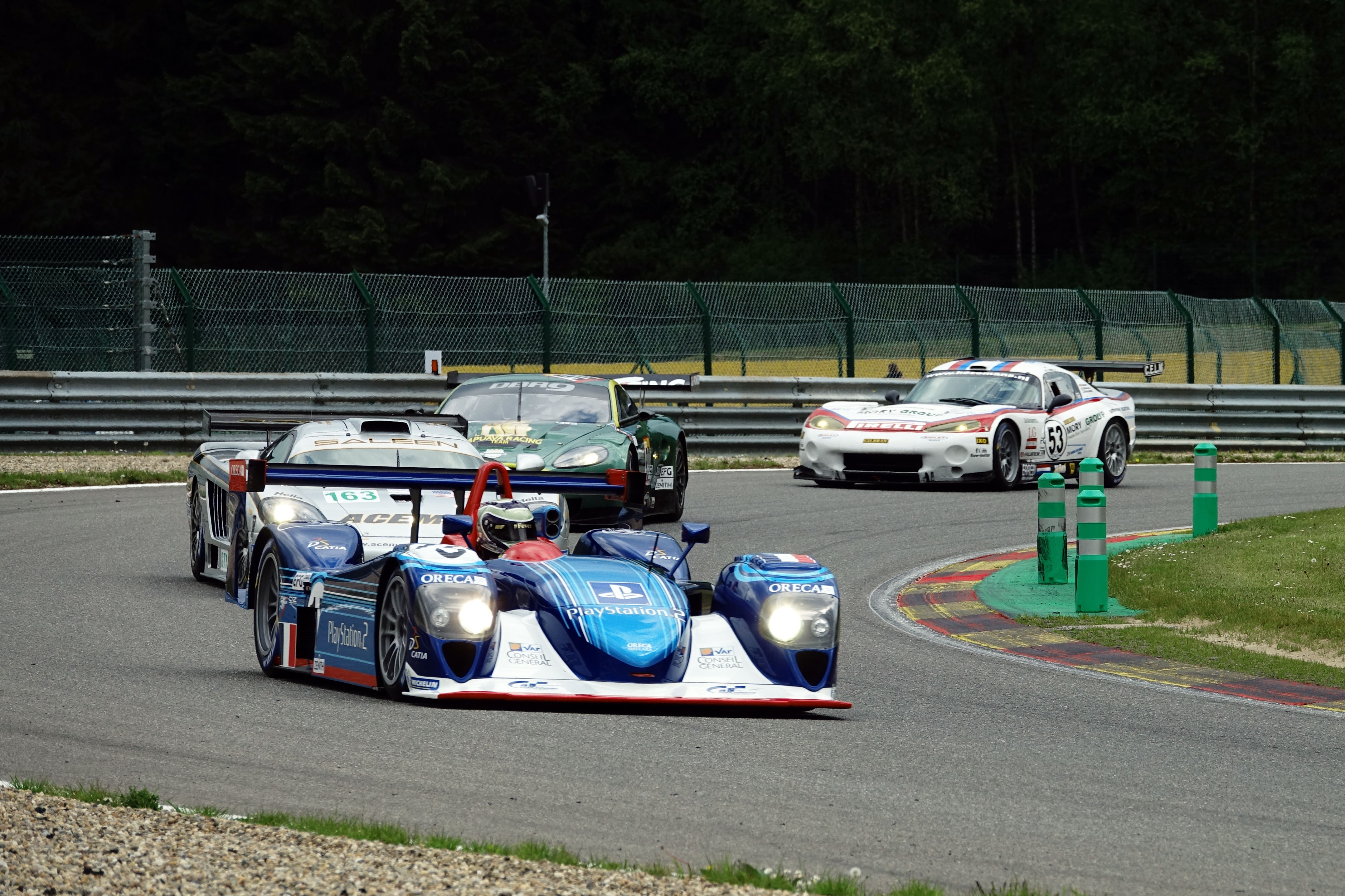 Spa Classic 2019 - Endurance Racing Legends